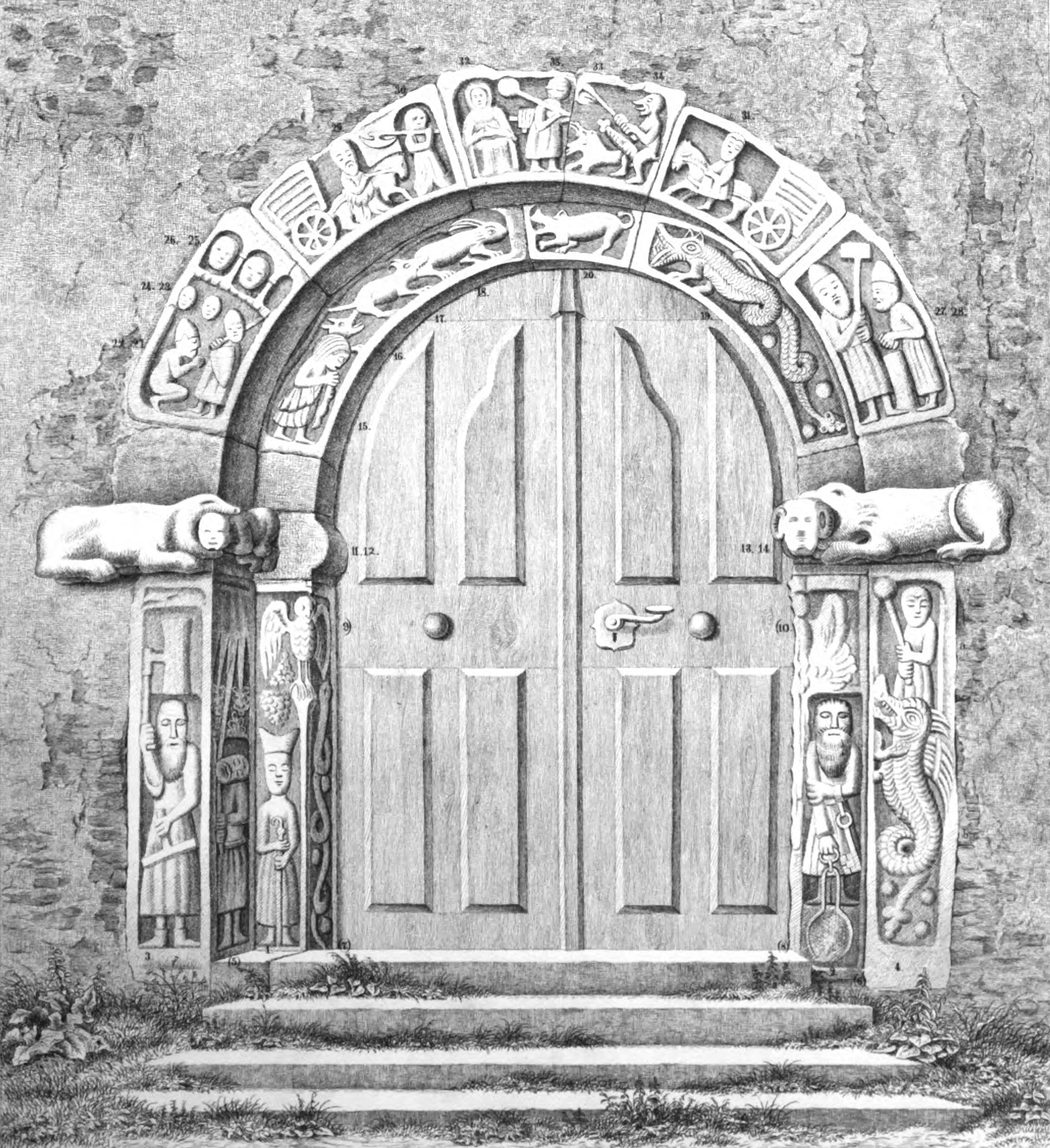 Romanisches Portal der Kirche St. Petri in Großen-Linden, Hessen, Deutschland